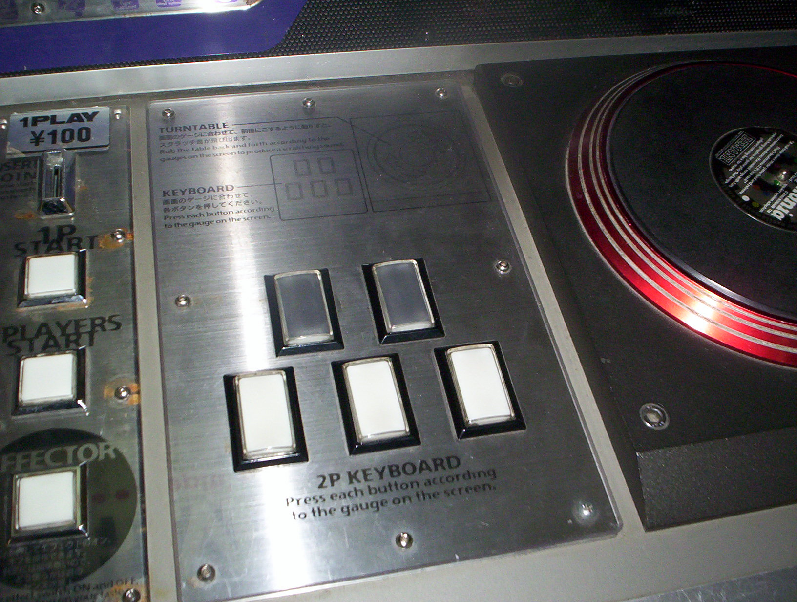 Beatmania controls